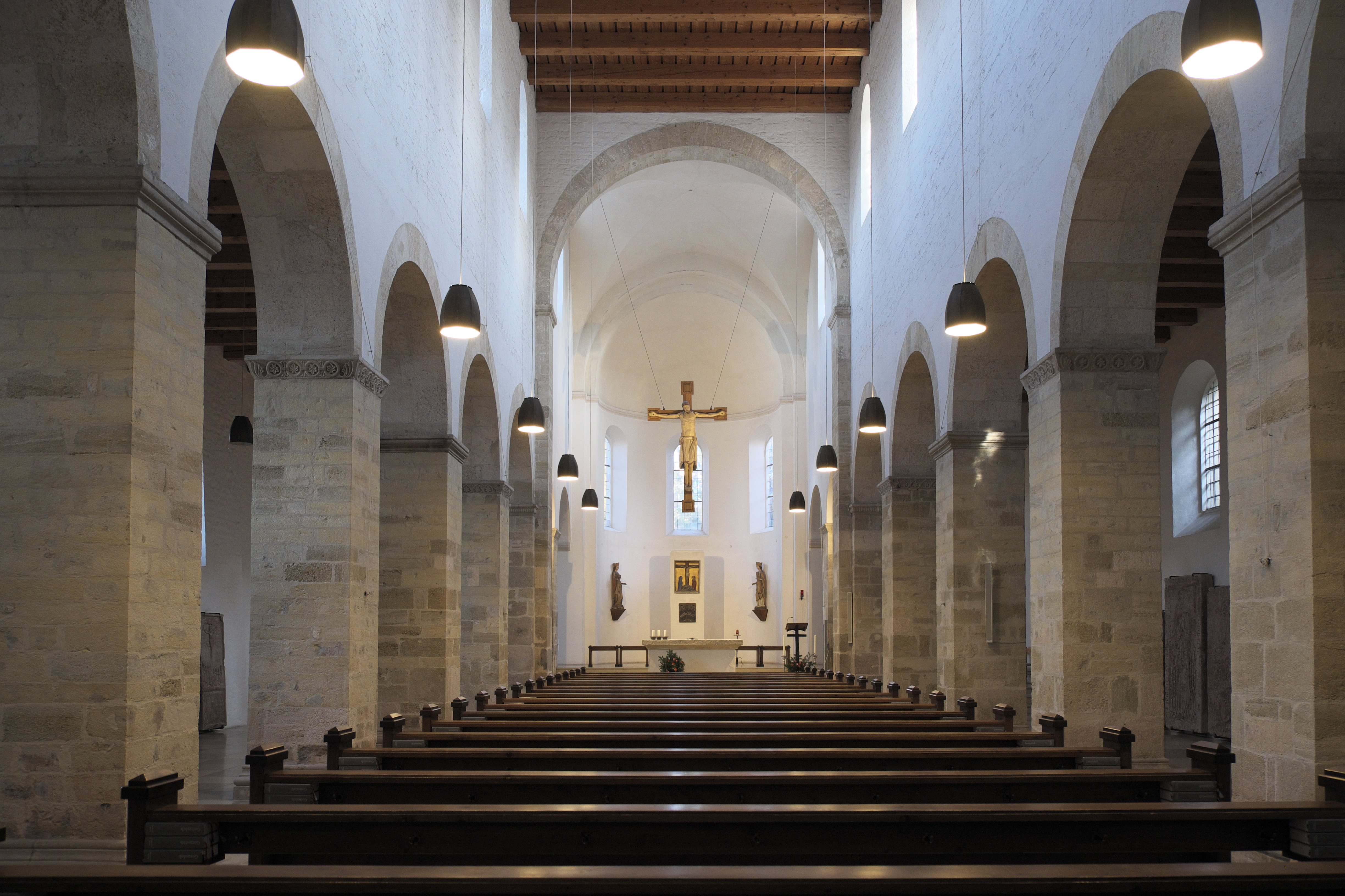 Alte katholische Pfarrkirche St. Peter in Straubing (Bayern/Deutschland), Innenraum